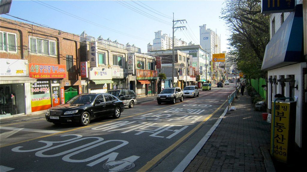 Bucheon